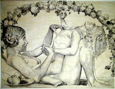 Lebensfreude/Kriegskinder